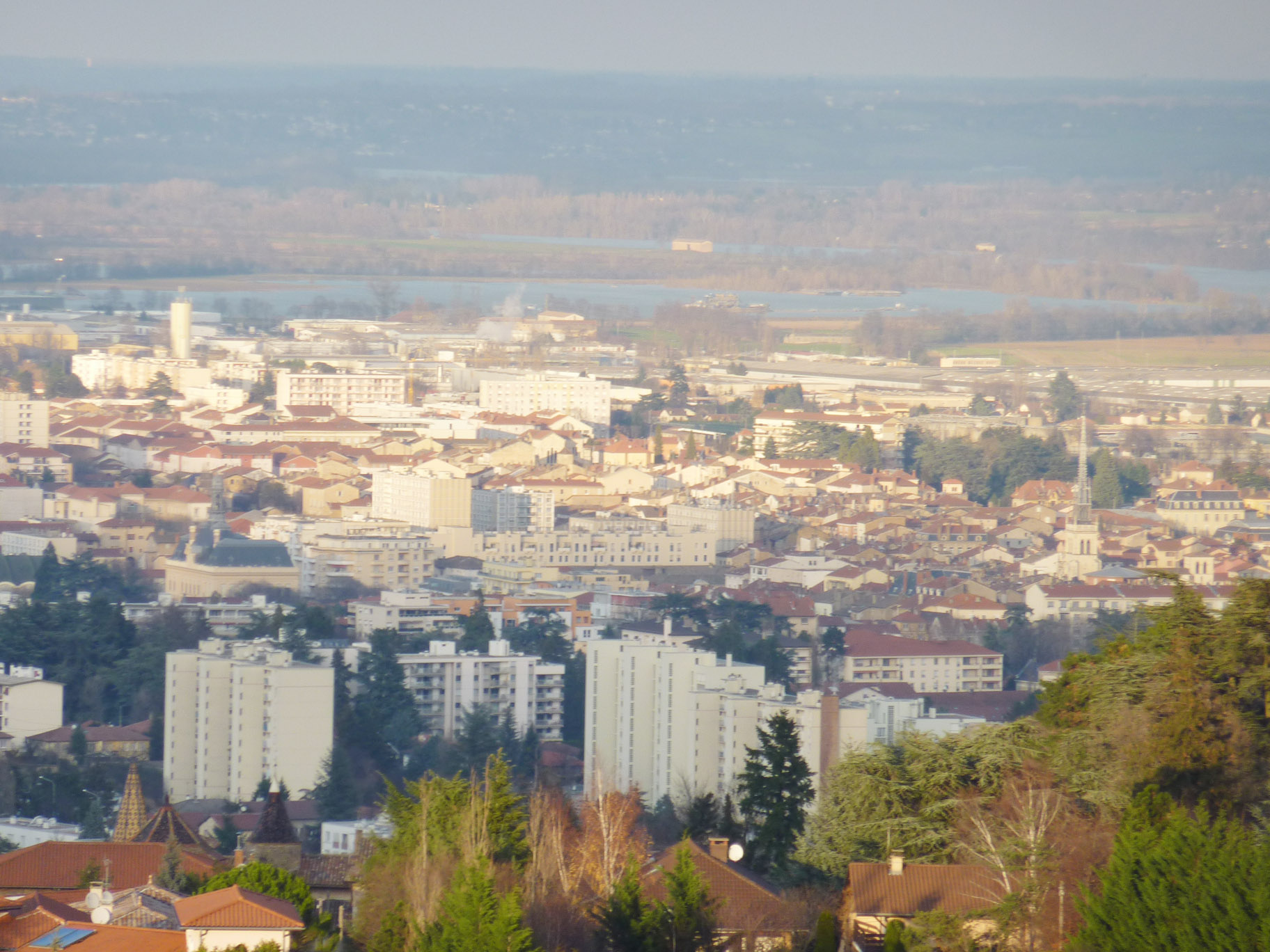 Vue lointaine de l'agglomération de Villefranche-sur-Saône.